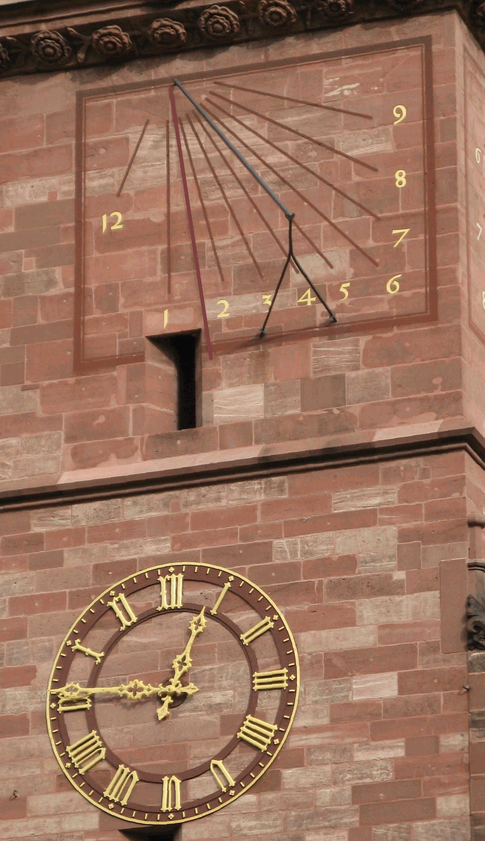 Sonnenuhr und Turmuhr am Basler Münster, Süd-West